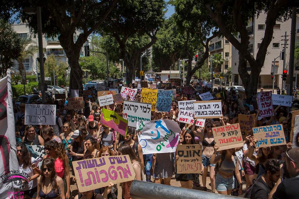 אלפי נשים בצעדת השרמוטות ת"א 2017